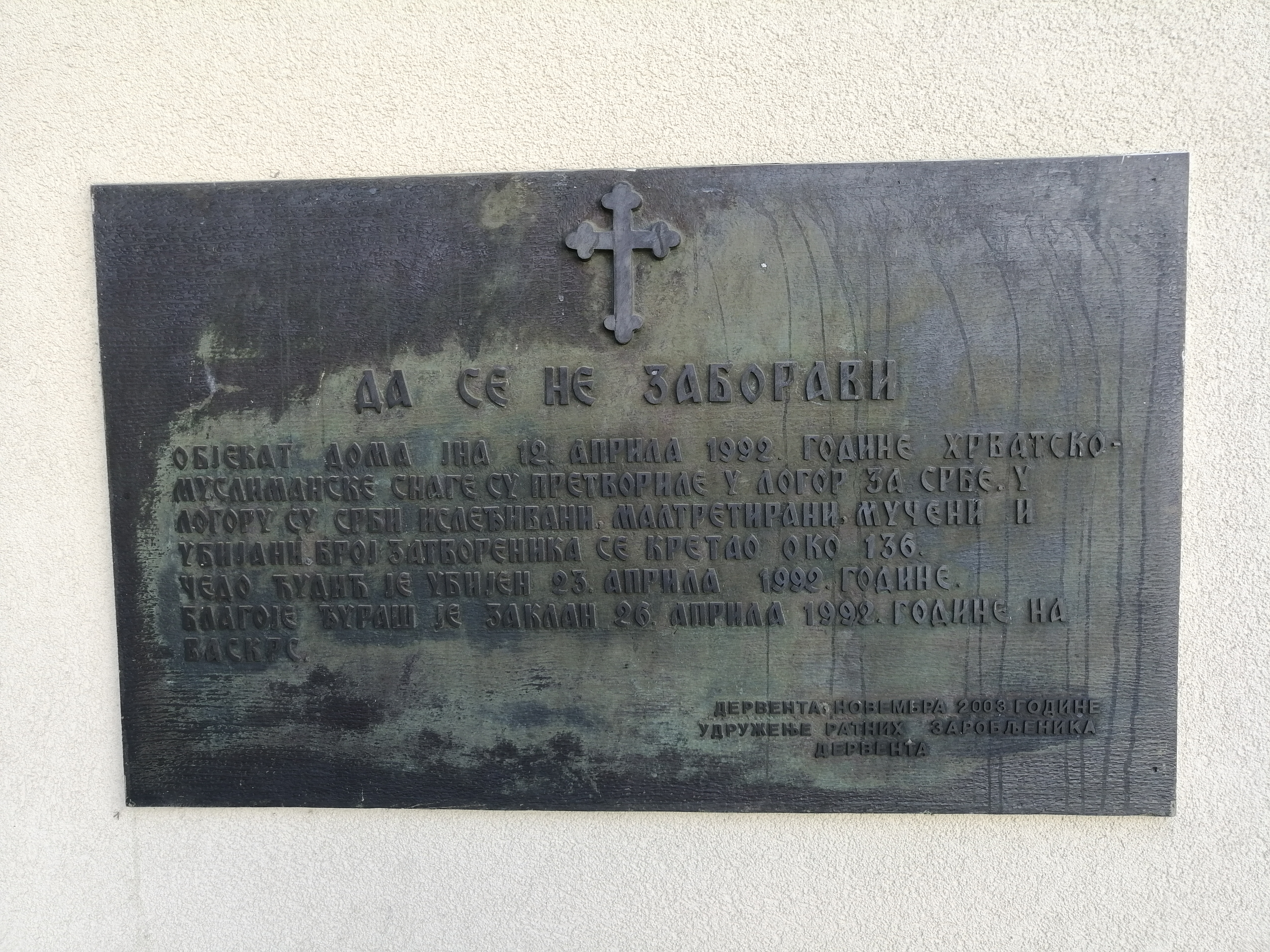 Natpis na ulazu u Dom kulture u Derventi.